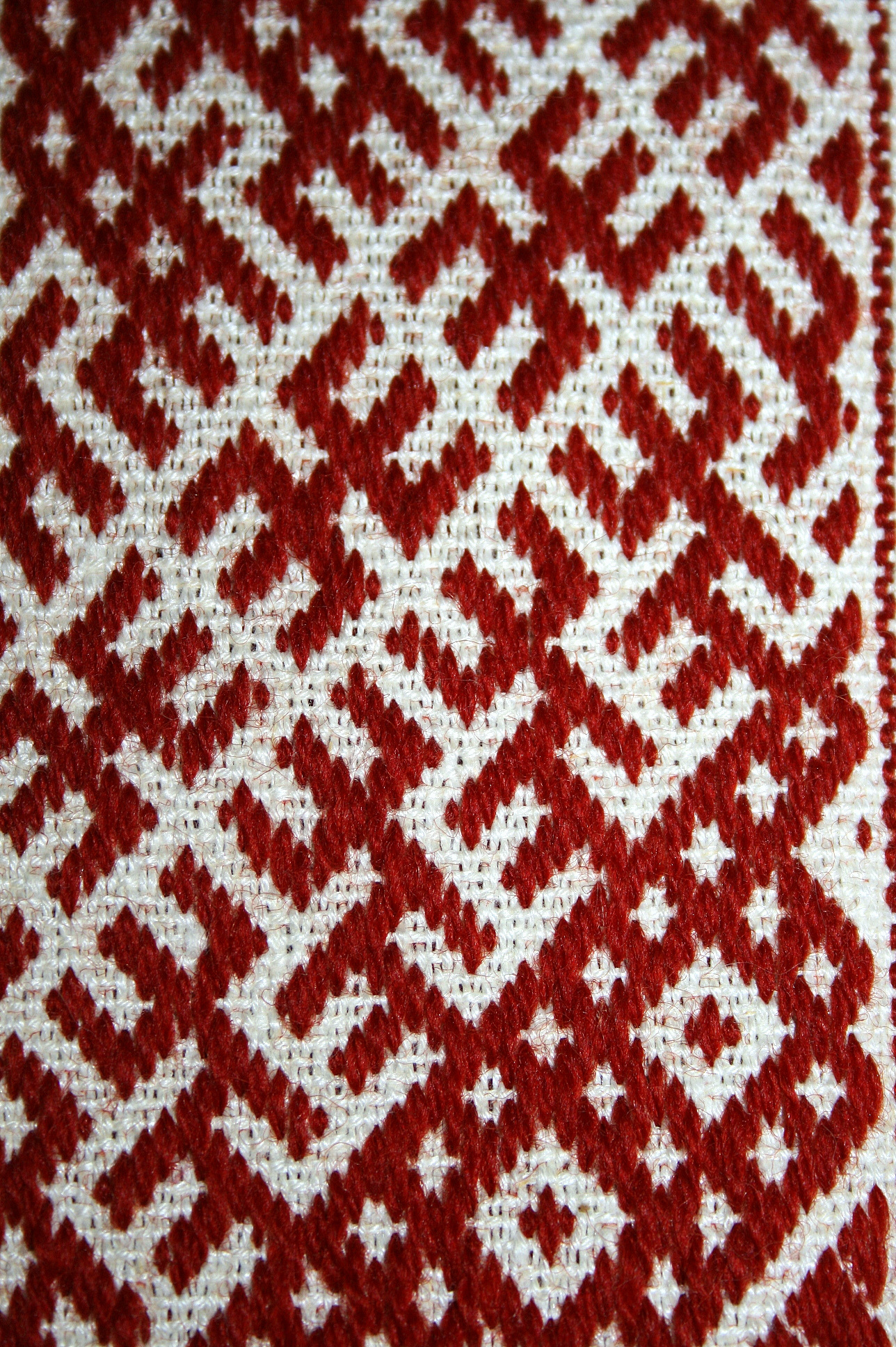 Lielvārdes jostas fragments